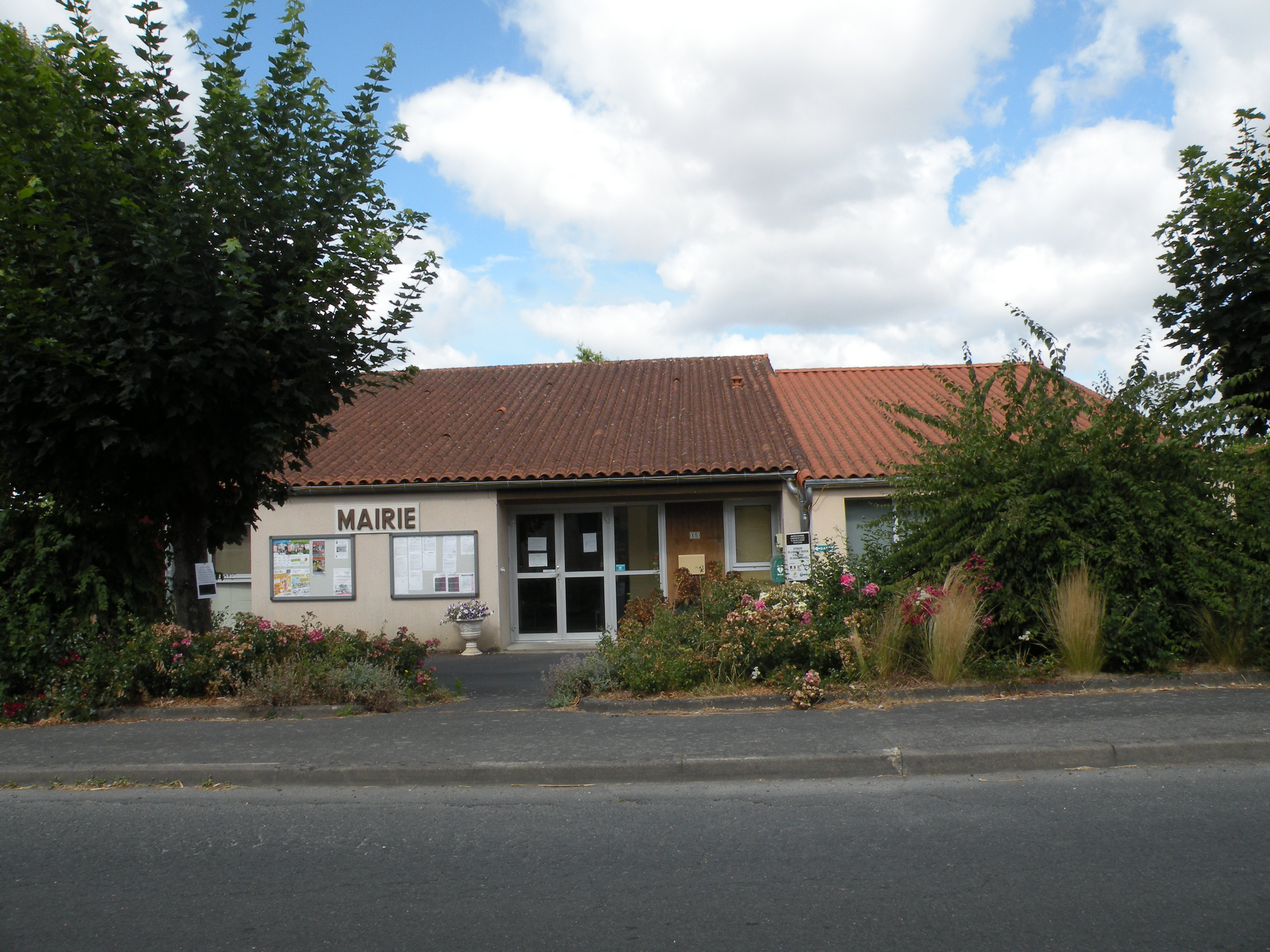 Clessé (Deux-Sèvres)